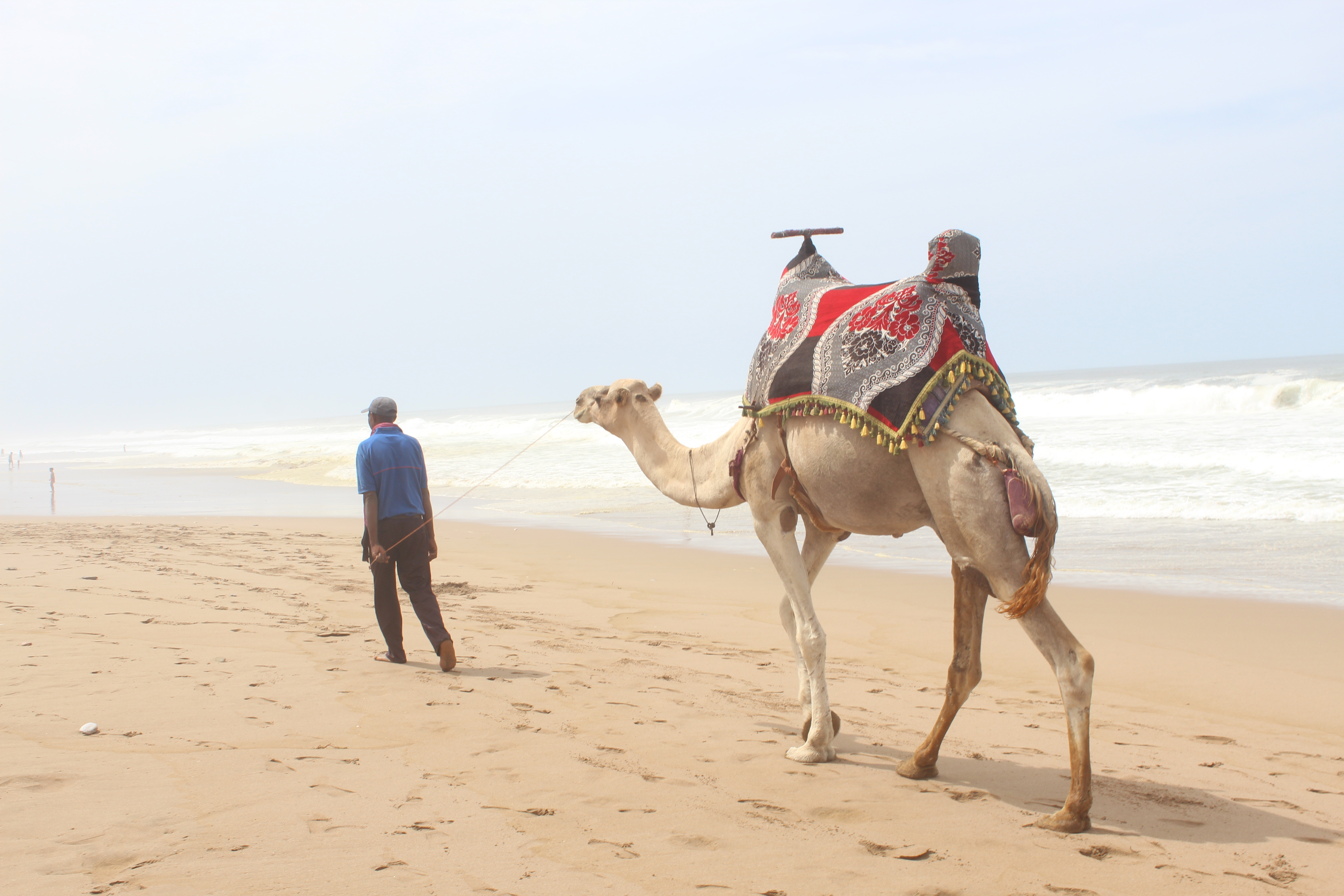 جمل عربي بشاطئ أكلو. تيزنيت